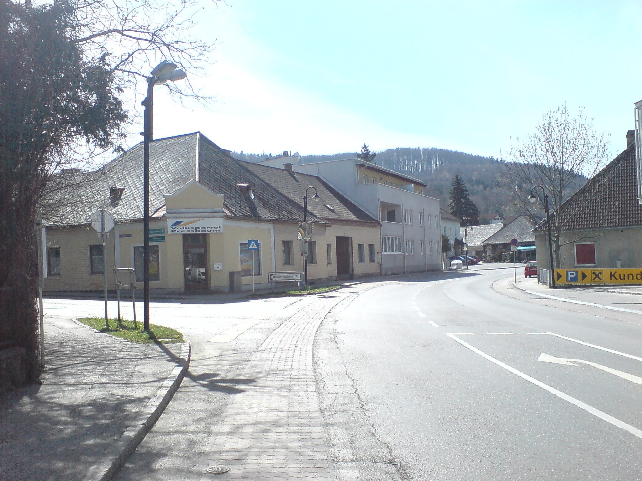 Die Stelle an der die Strasse in die Pfalzau von der Hauptstrasse in Pressbaum abzweigt, ist eine der letzten Stellen, wo sich der ursprüngliche Wienerwalddorfcharakter des Ortes erhalten hat. Links im Hintergrund das "Gasthaus Lindenhof", vermutlich das älteste Haus von Pressbaum. Doch auch in dieses Bild sind bereits die nichtssagenden Wohnblöcke eingedrungen. Links im Hintergrund das "Gasthaus Lindenhof", vermutlich das älteste Haus von Pressbaum.